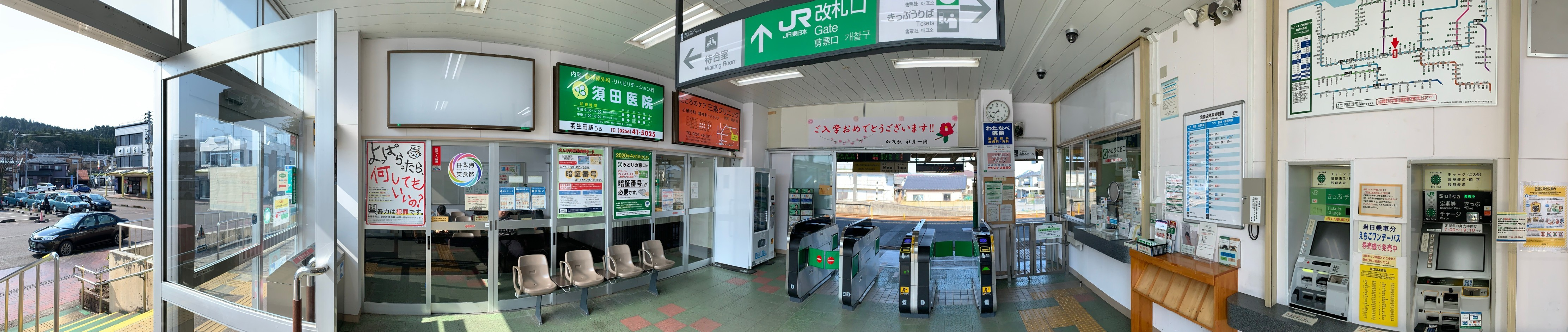 加茂駅東口駅舎コンコース（2020年4月）